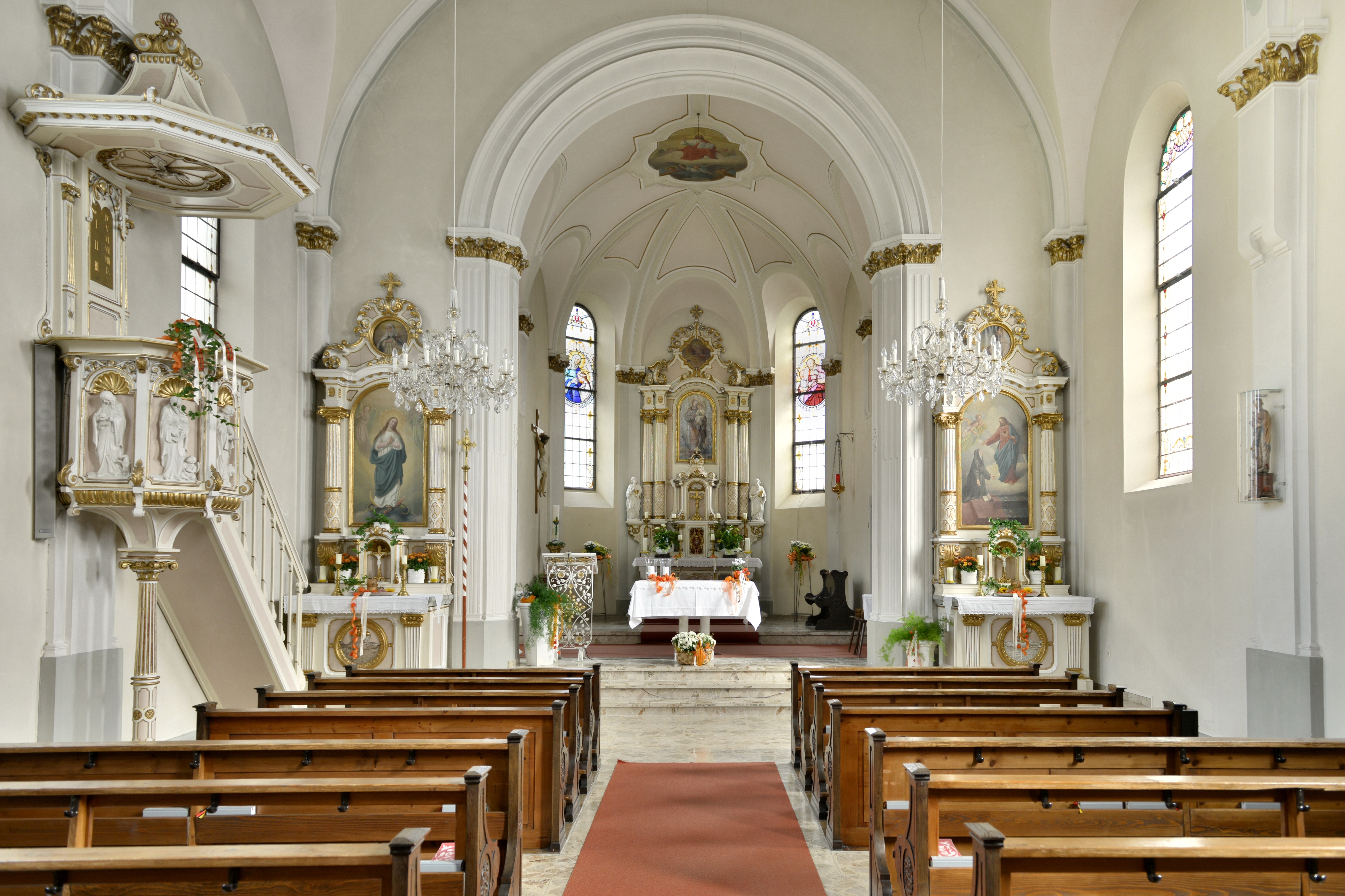 Kath. Pfarrkirche hl. Josef am Oberberg 1 in Dafins-Zwischenwasser.